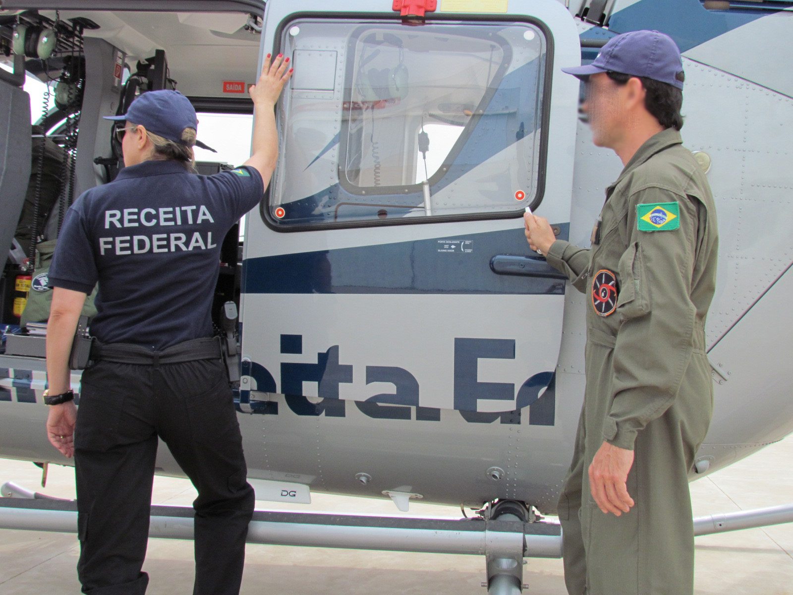 ATRFB do Goep embarca no helicóptero EC-135 da Receita Federal do Brasil durante a Operação Grifo II (19/10/2012)